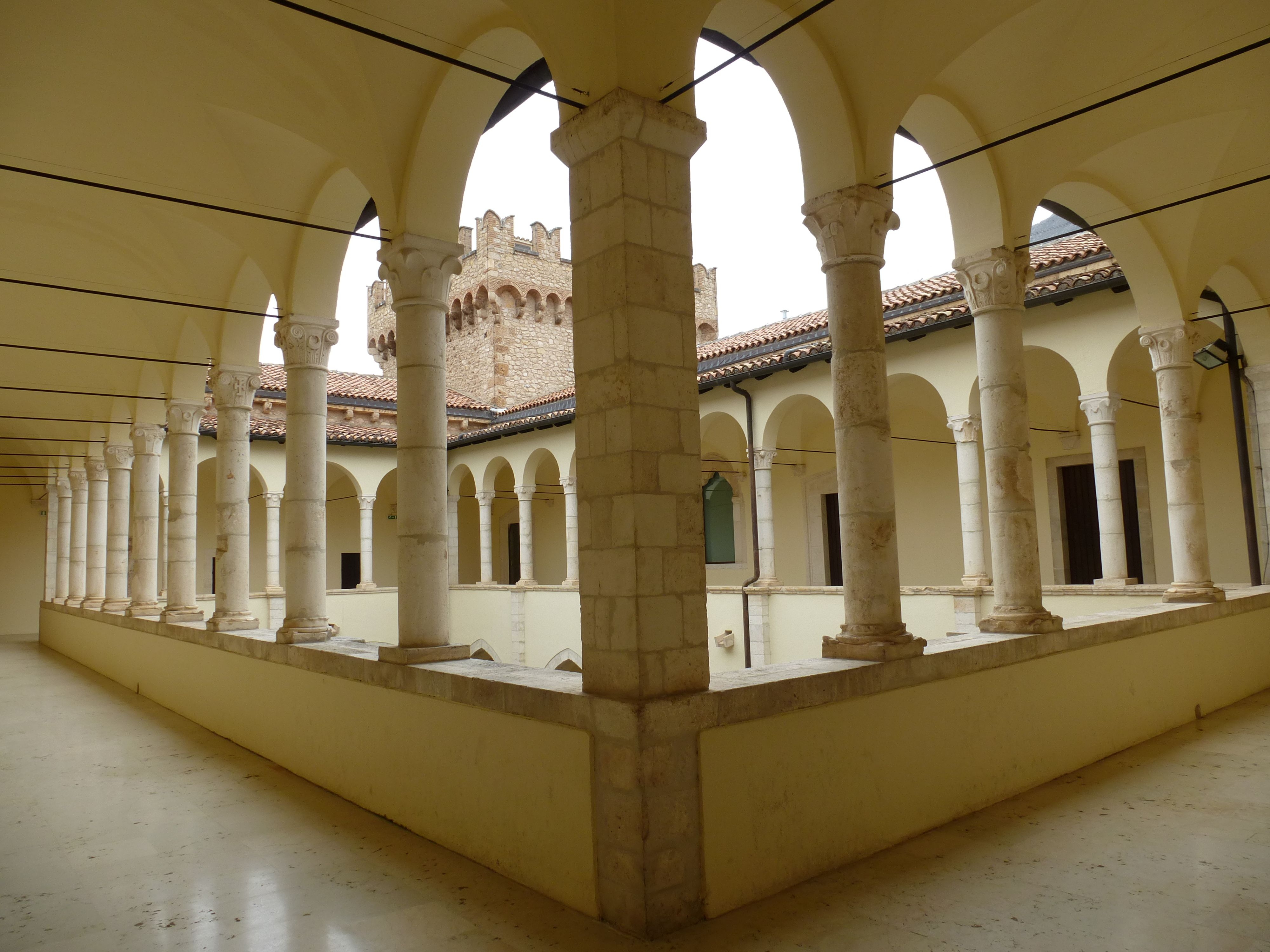 Castello Piccolomini di Celano: Innenhof